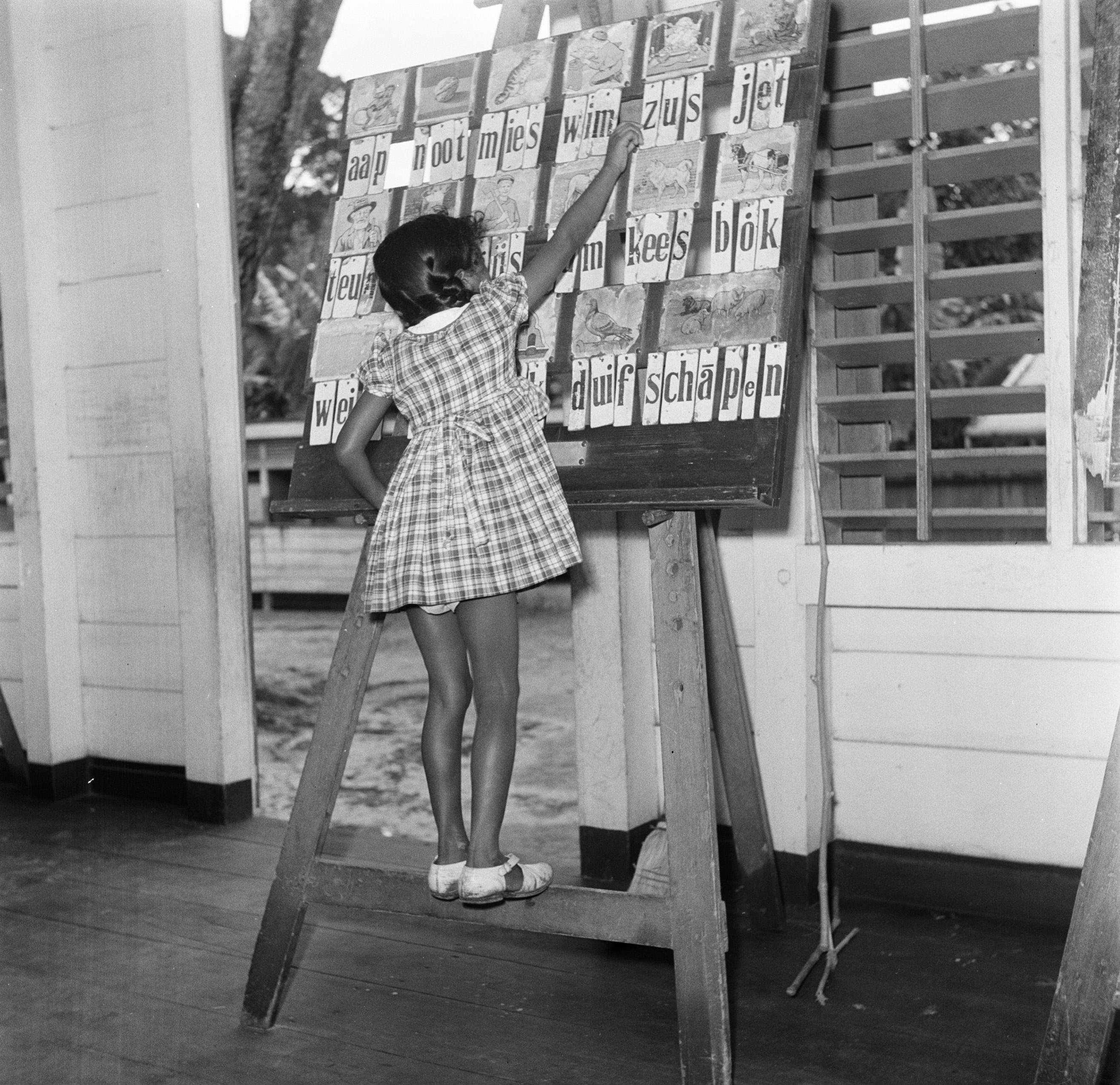 Collectie / Archief : Fotocollectie Van de Poll Reportage / Serie : Reis naar Suriname en de Nederlandse Antillen Beschrijving : Meisje met leesplank Aap Noot Mies op de Oranjeschool (Lagere School) in Paramaribo Datum : 1947 Locatie : Suriname Trefwoorden : leerlingen, scholen Persoonsnaam : oranjeschool Fotograaf : Poll, Willem van de, [onbekend] Auteursrechthebbende : Nationaal Archief Materiaalsoort : Negatief (zwart/wit) Nummer archiefinventaris : bekijk toegang 2.24.14.02 Bestanddeelnummer : 252-6219